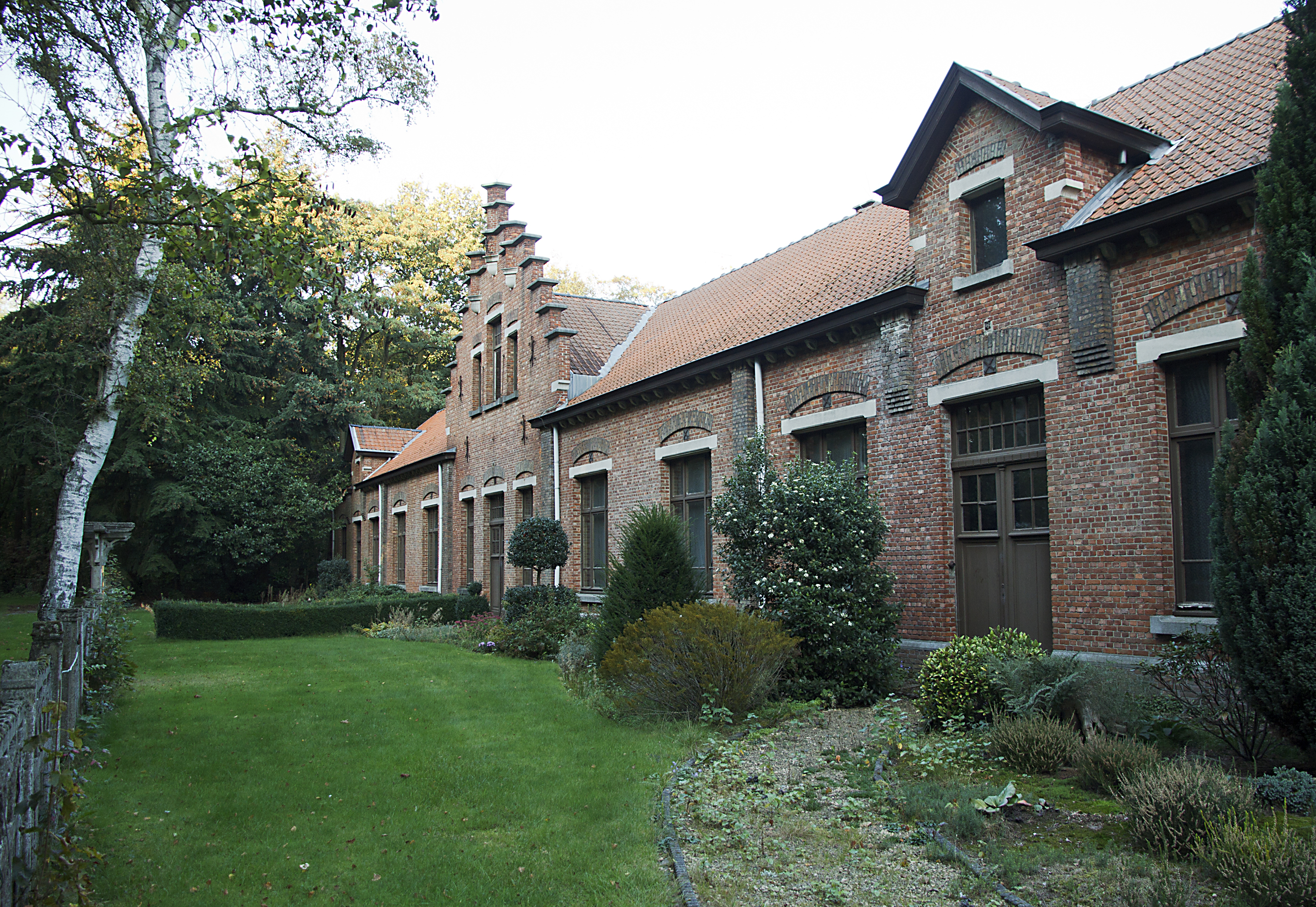 Het voormalig fabrieksschooltje van het glasfabriek Glaverbel,Kievitsheide 6, te Mol-Gompel in de provincie Antwerpen.